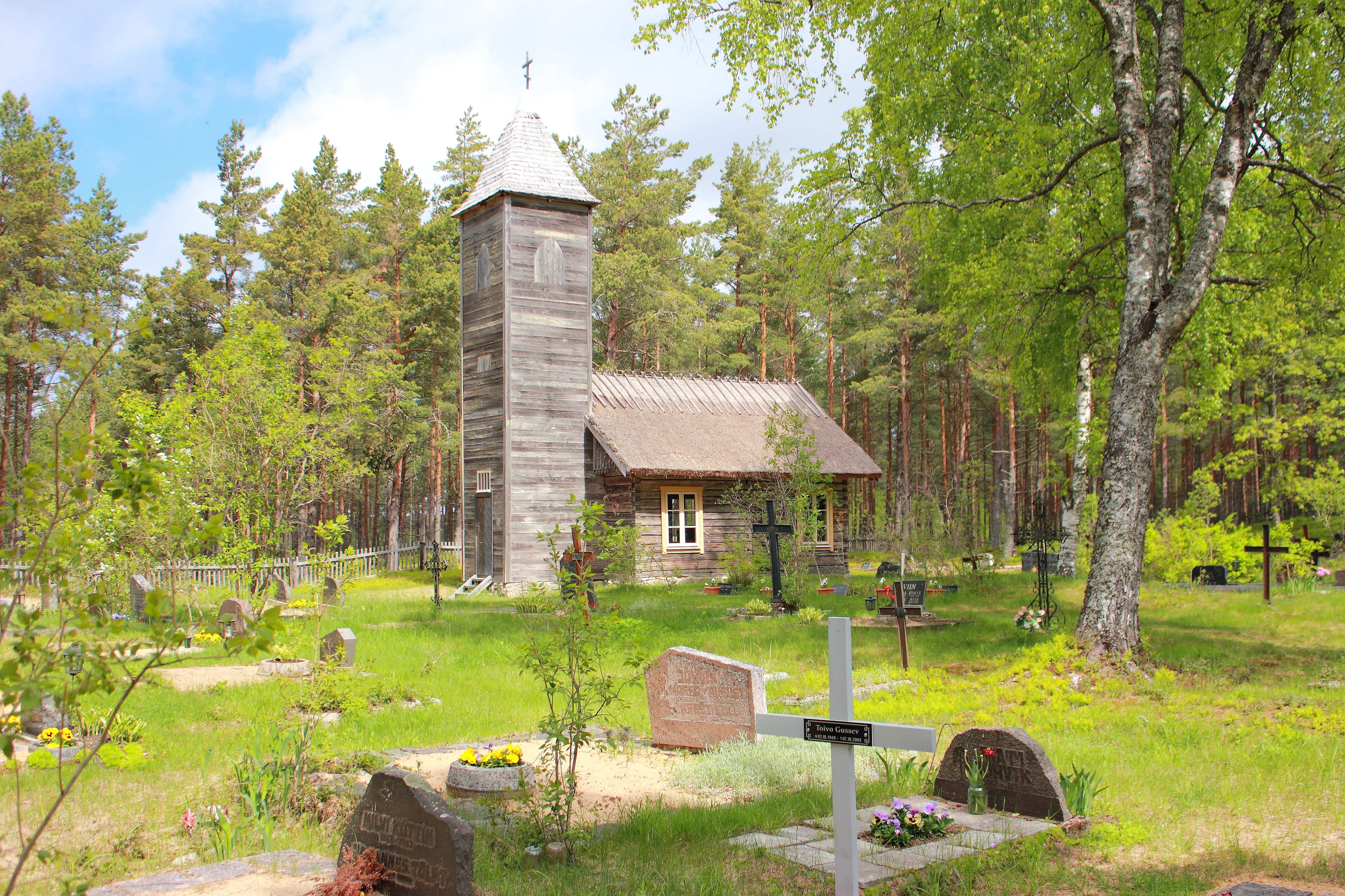 Malvaste õigeusu kabel Hiiumaal